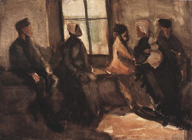 Pintura estancia en La Haya